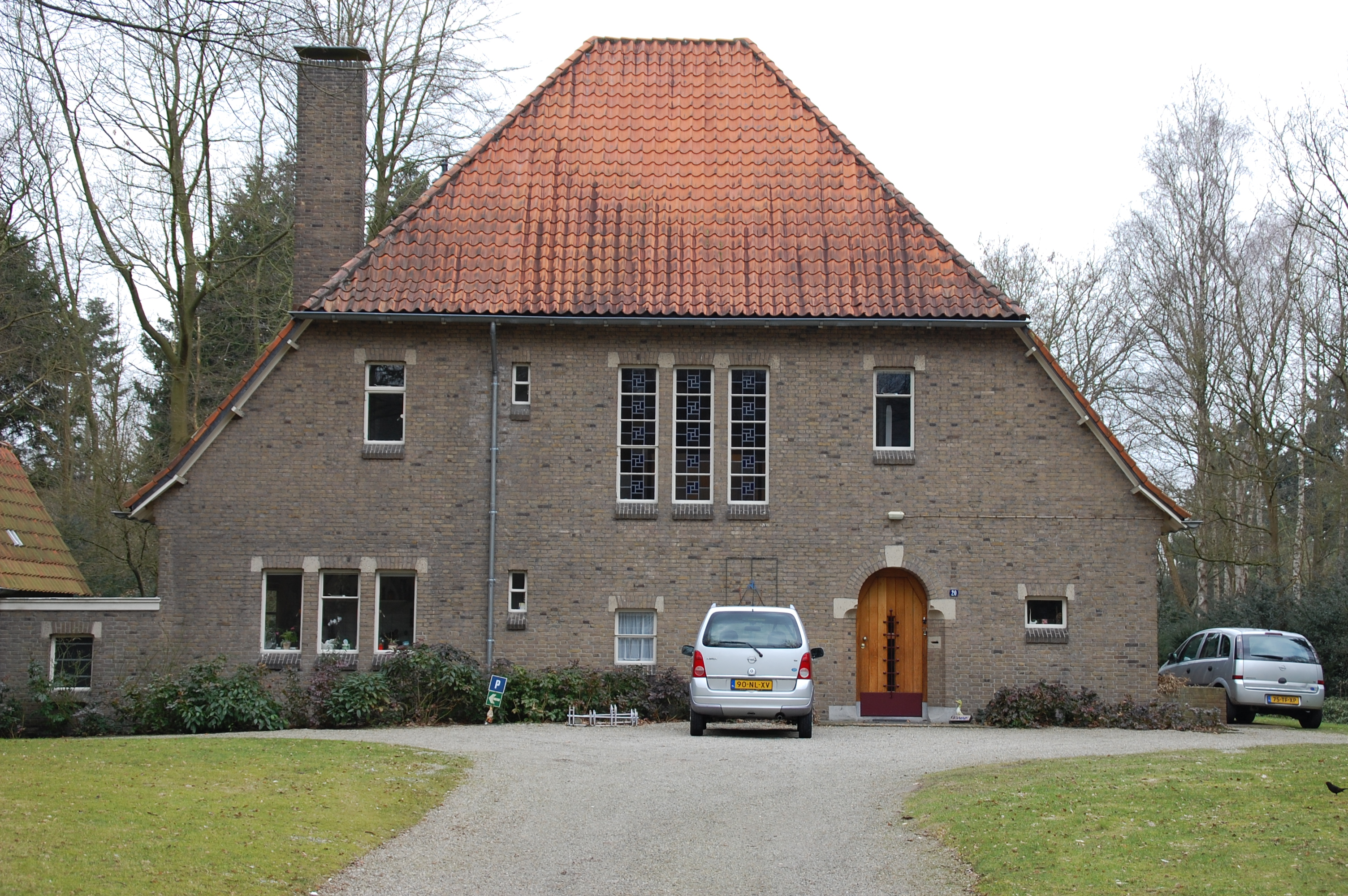 Dienstwoning bij Onze Lieve Vrouw ter Eem in Amersfoort 517691